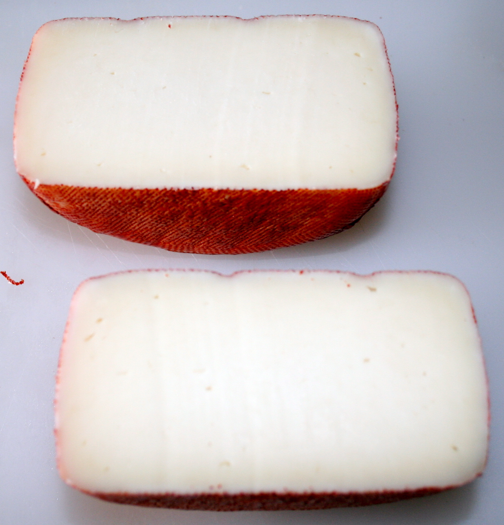 Queso de Cueva de Mar, corte